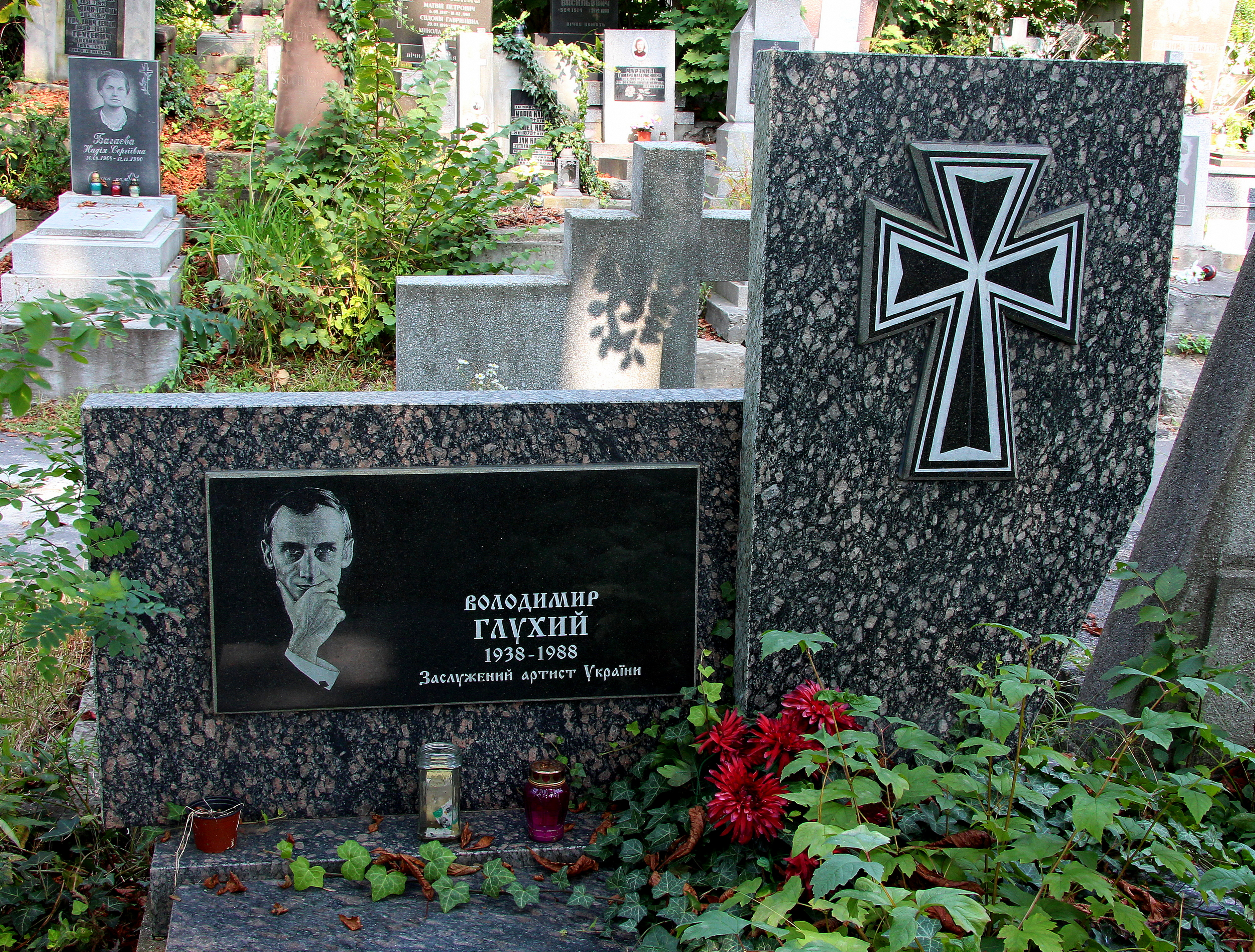 Янівський цвинтар.